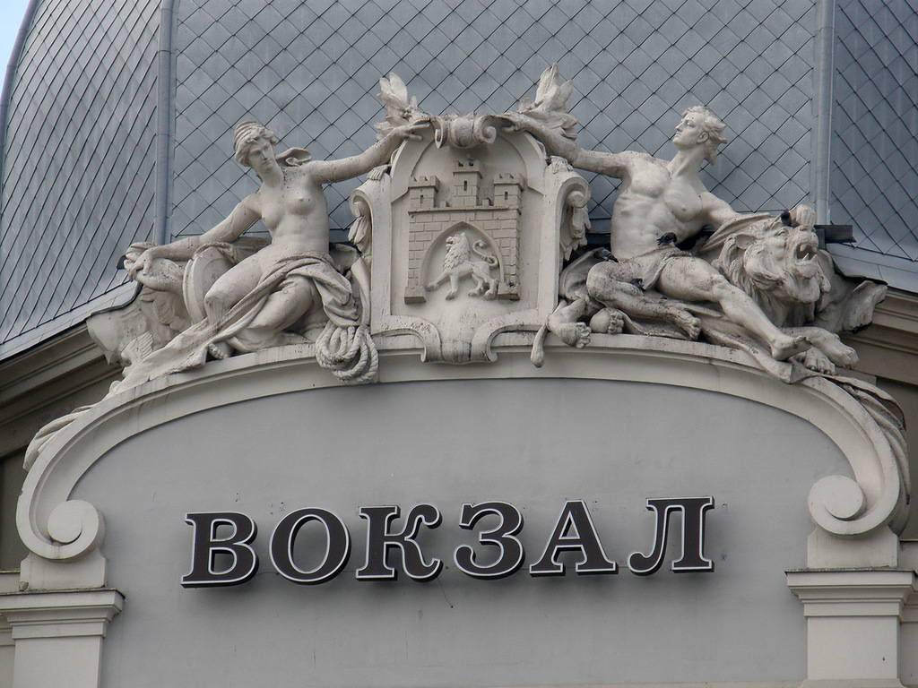 Скульптрурна композиція на фасаді Головного залізничного вокзалу у Львові- скульптор Кузневич